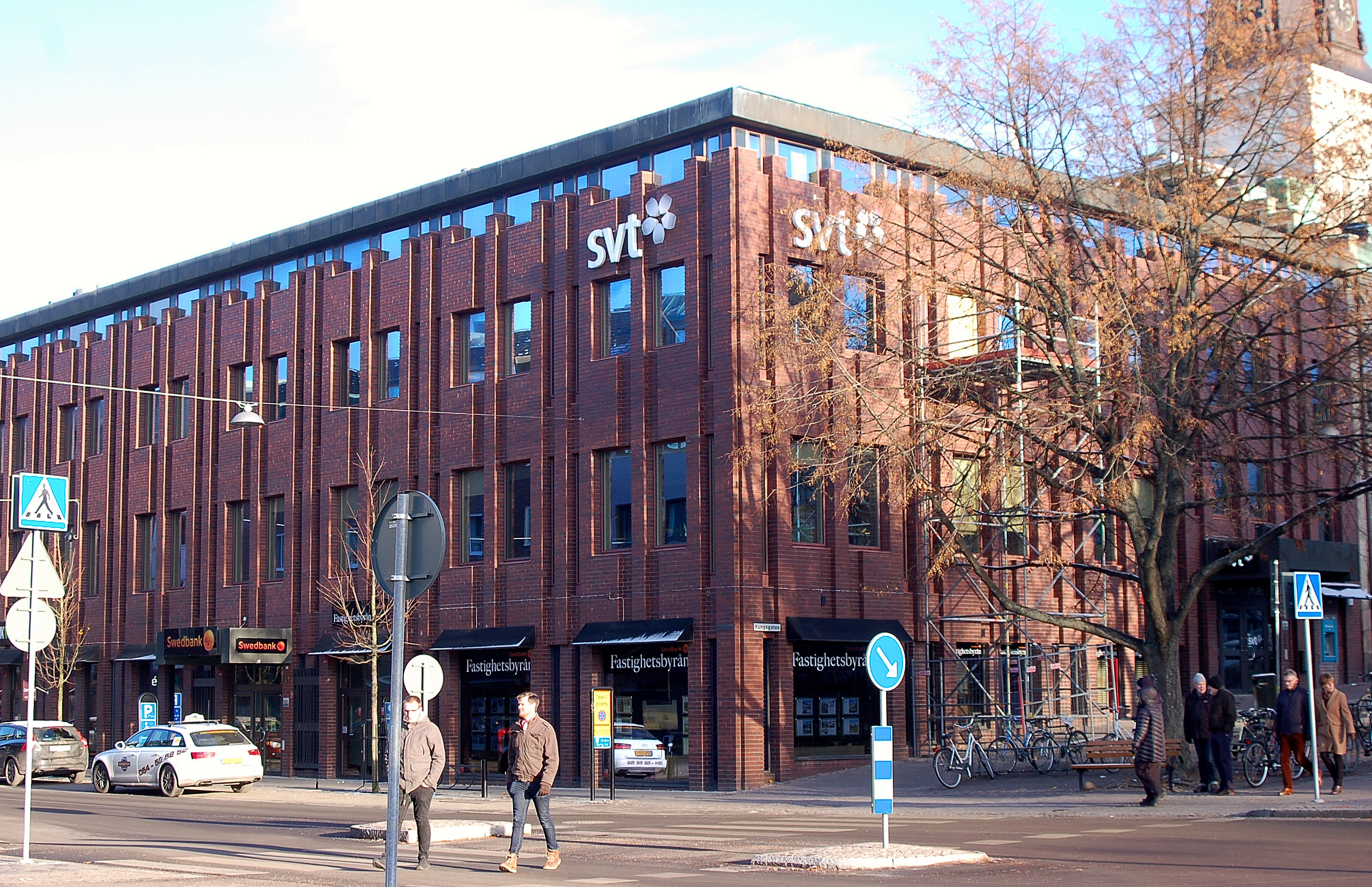 Svts lokalredaktion i Karlstad. Byggår 1970. Byggherre: Sparbanken. Arkitekt: Bo Nylén (Havstad, Hollström, Lindell AB )